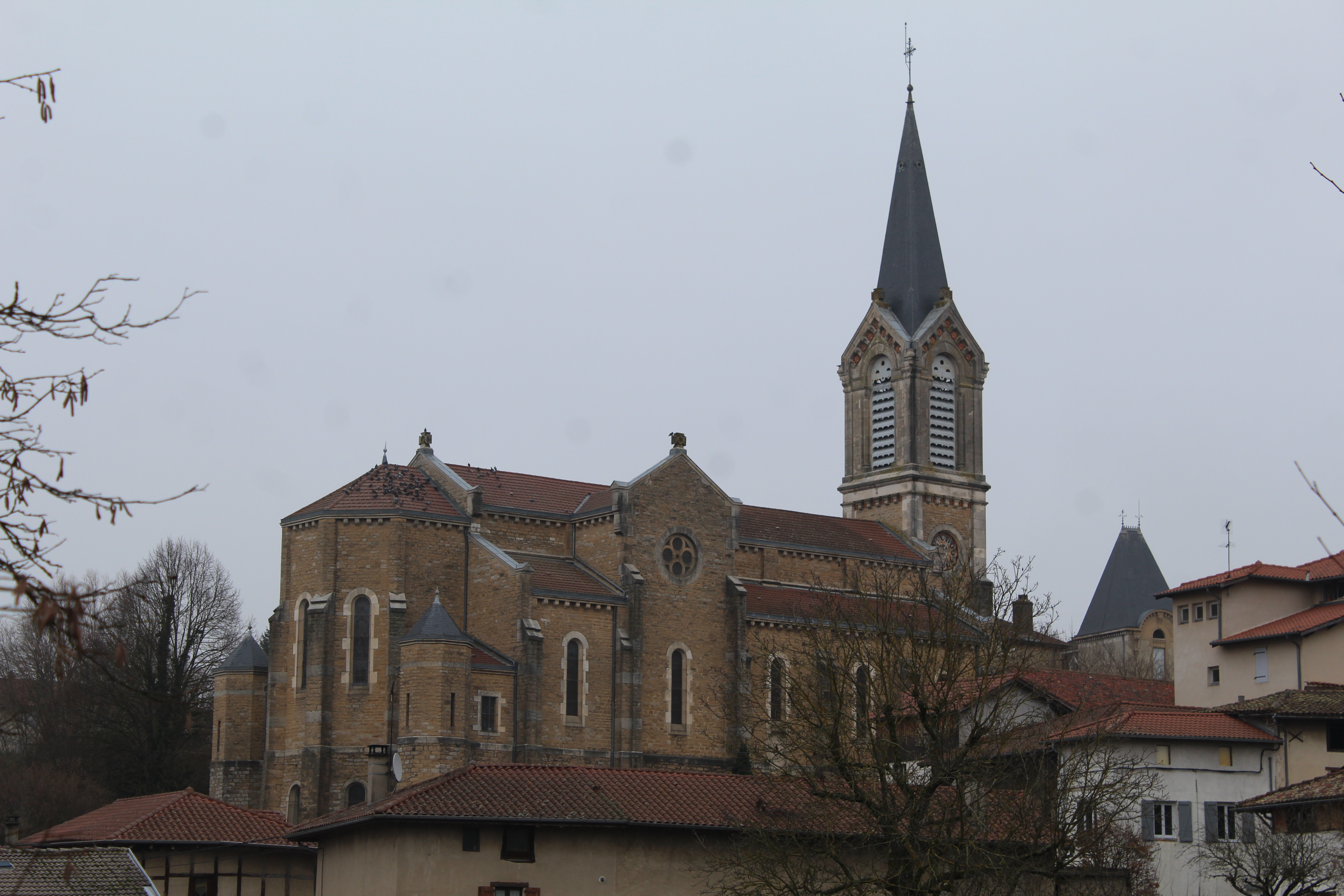 Église Saint-Maurice de Neuville-les-Dames.